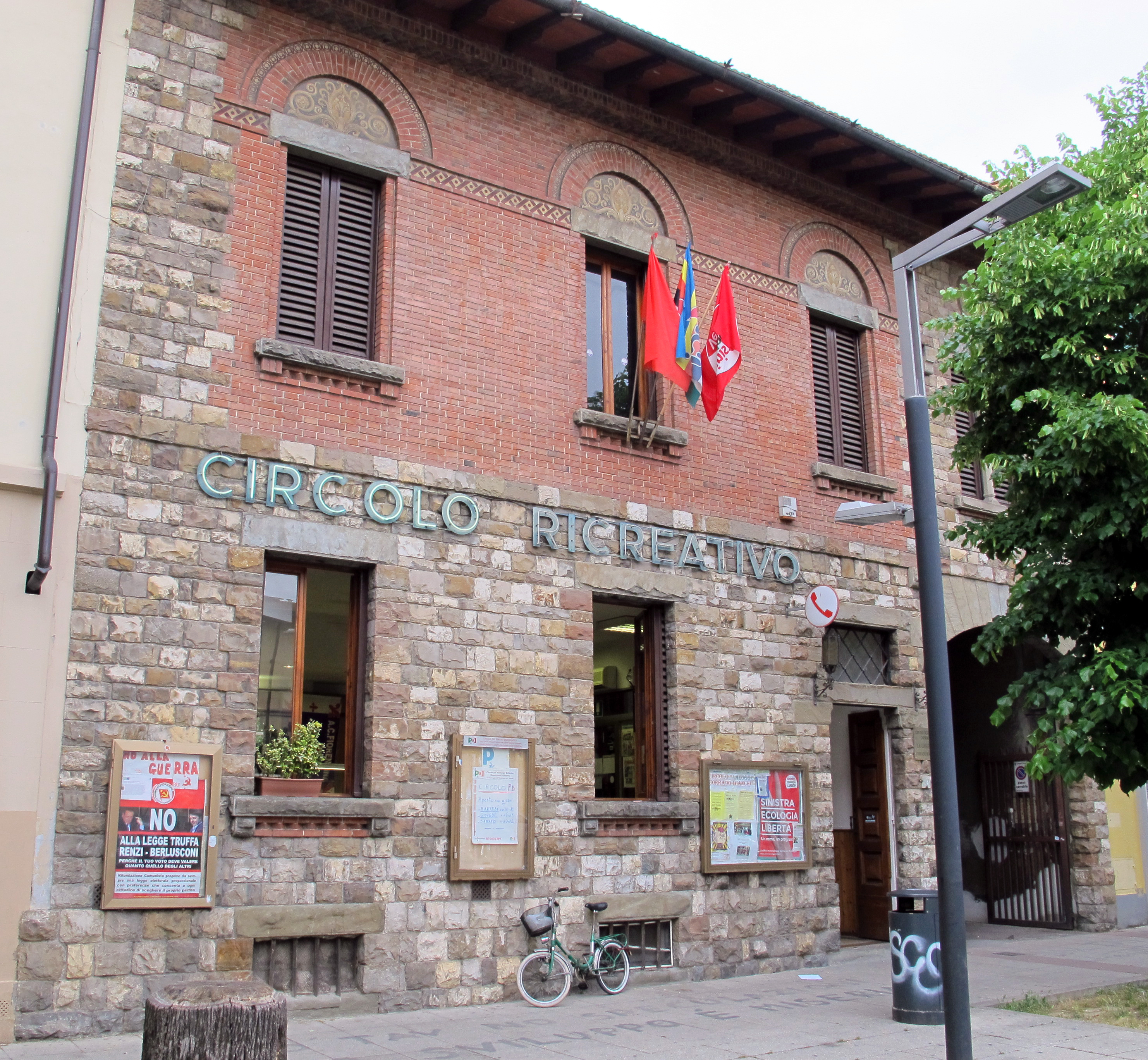 Firenze, miscellanea